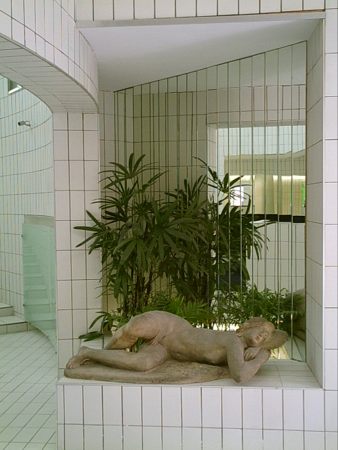 Casa museo Remo Brindisi This is a photo of a monument which is part of cultural heritage of Italy.